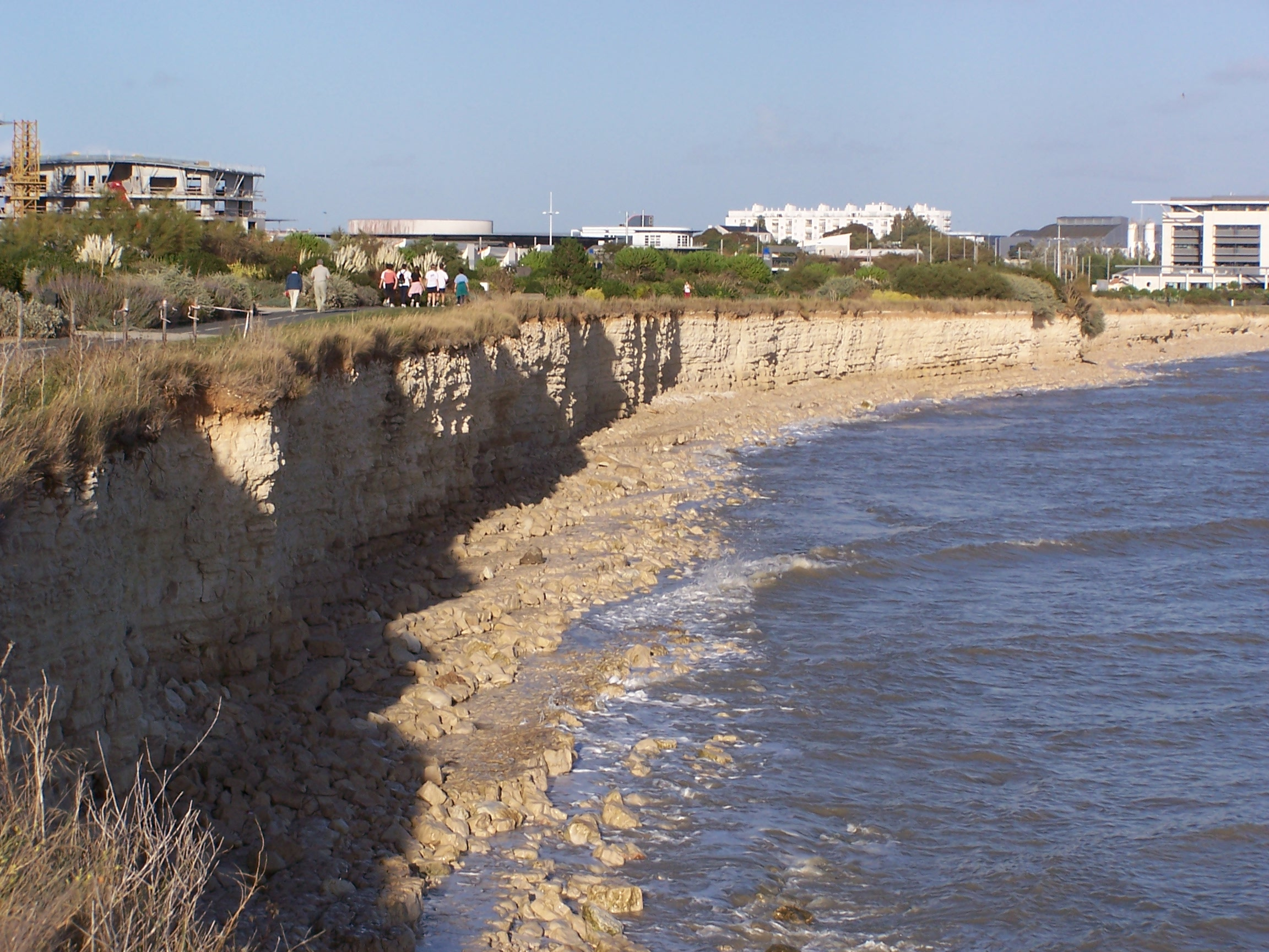 Photographie prise sur les bords de mer, aux Minimes, à La Rochelle, en Charente-Maritime.